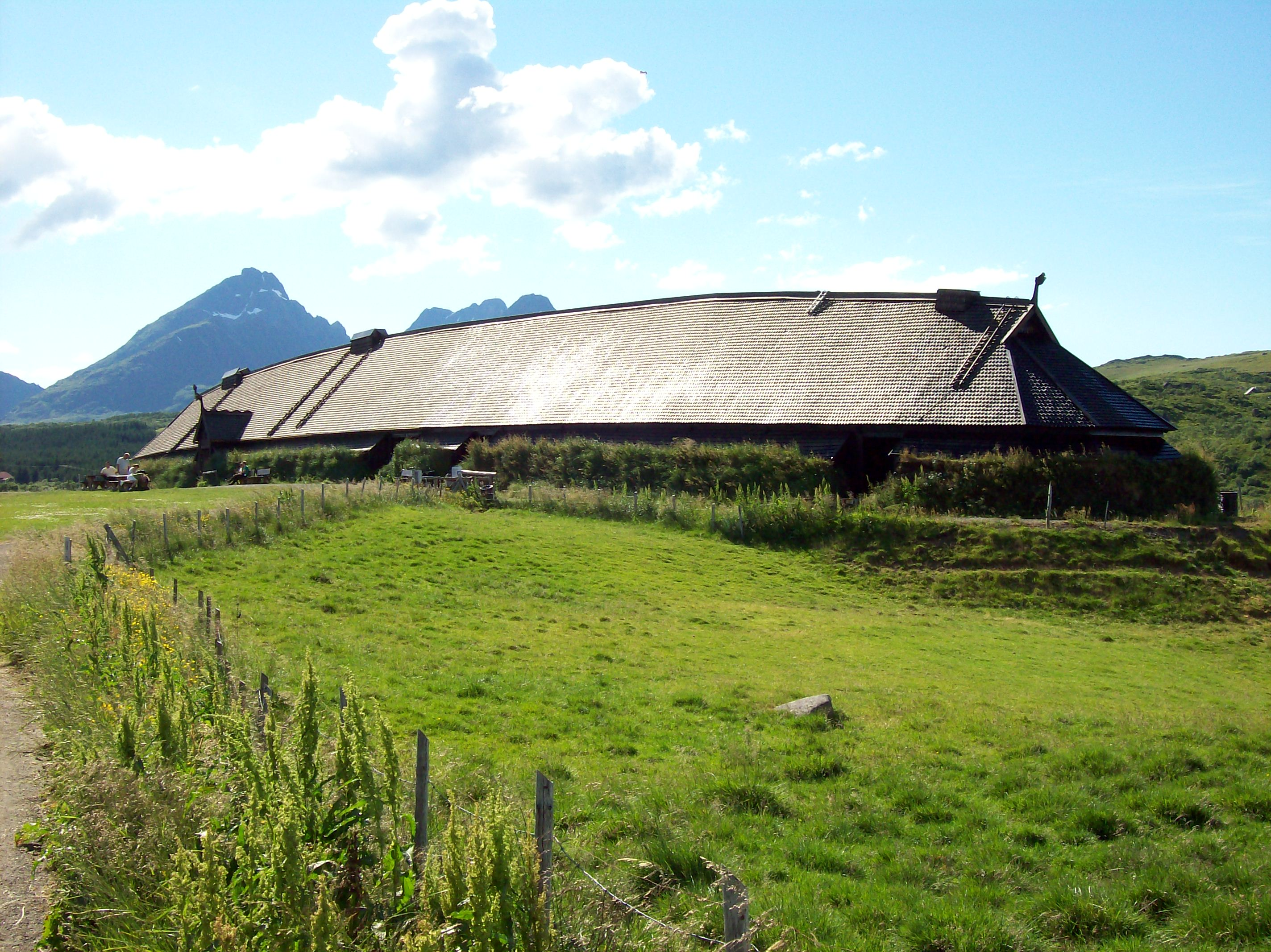 Viking museum -Longhouse